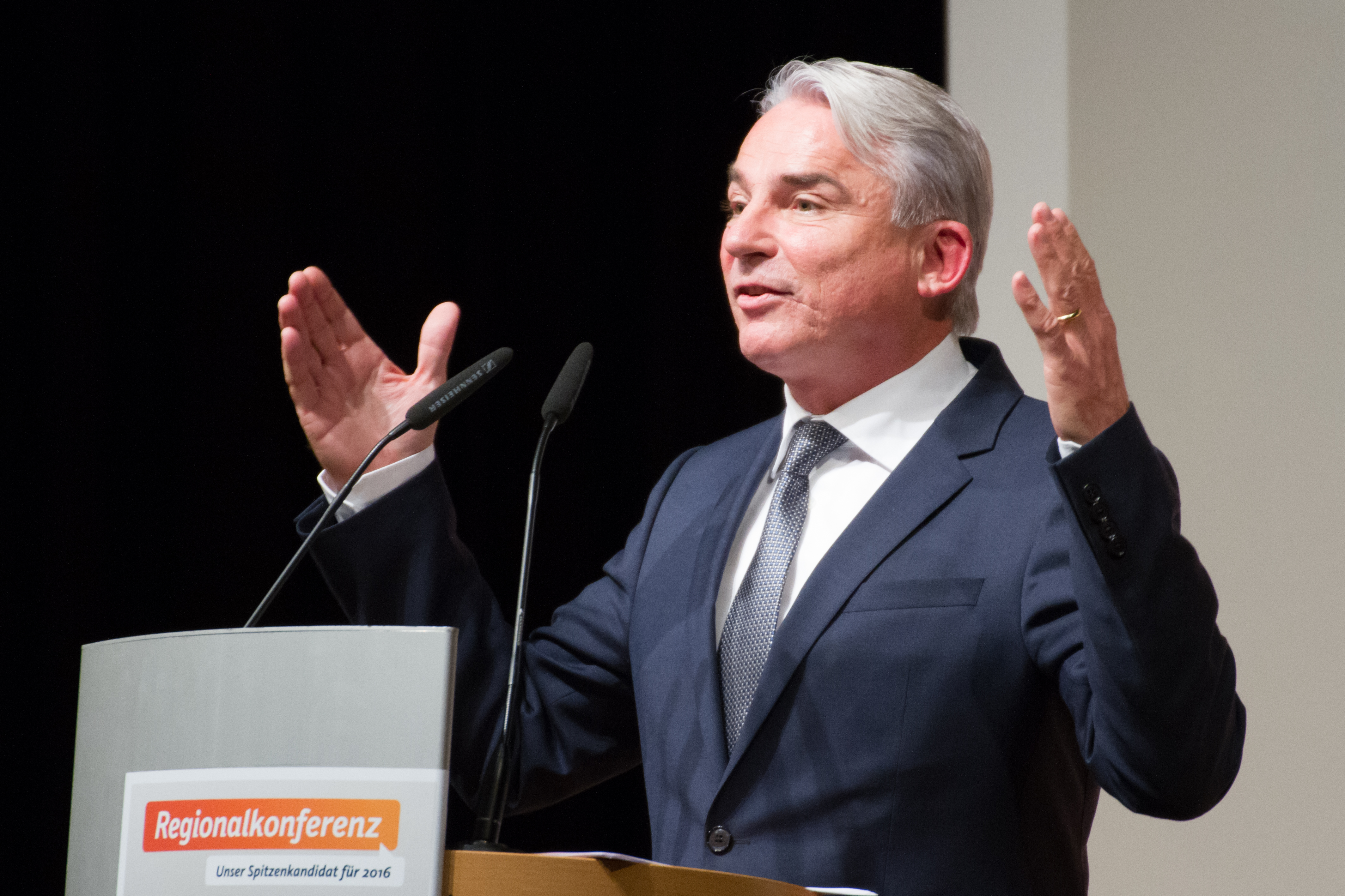 Serie: Regionalkonferenz der CDU Baden-Württemberg am 21. November 2014 in Appenweier zur Vorstellung der Bewerber für die Spitzenkandidatur bei der Landtagswahl 2016Bild: Thomas Strobl